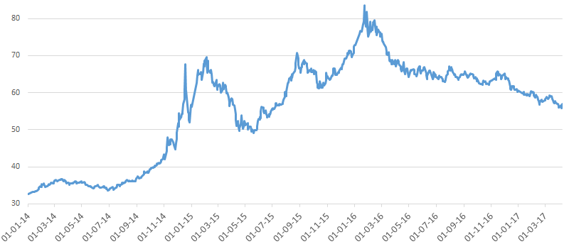 Динамика курса доллара США по отношению к рублю c 1.01.2014 по 22.08.2015. Данные ЦБ РФ